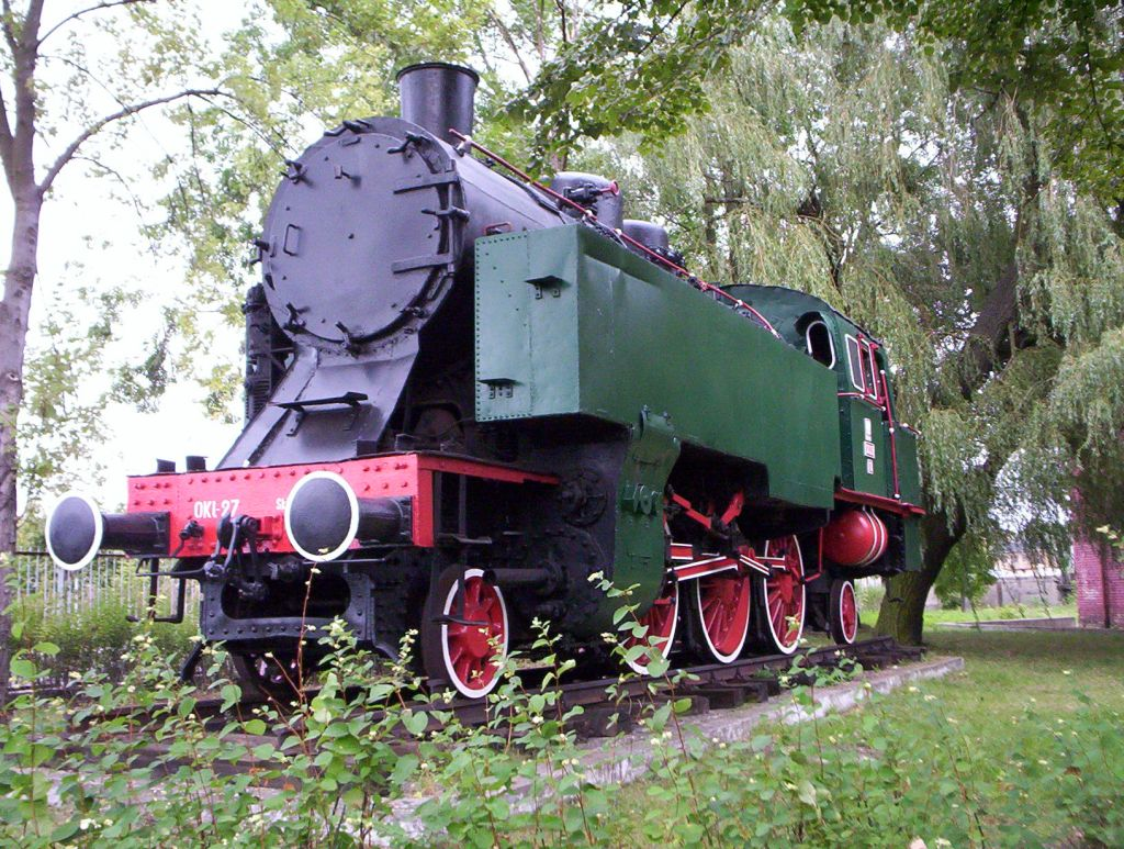 Parowóz OKl27-10 or Steam locomotive OKl27-10 in Skierniewice depot